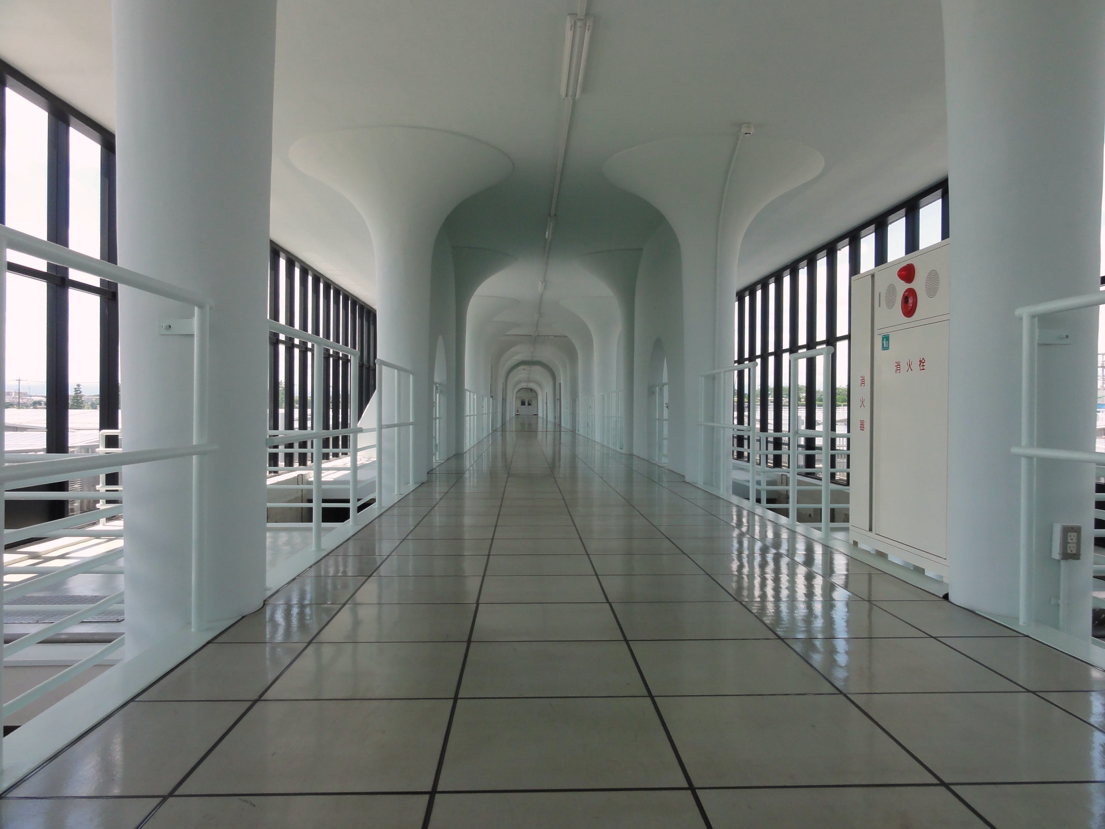 濾過池操作廊 終端側より（2015年6月6日 長沢浄水場見学会 にて撮影）